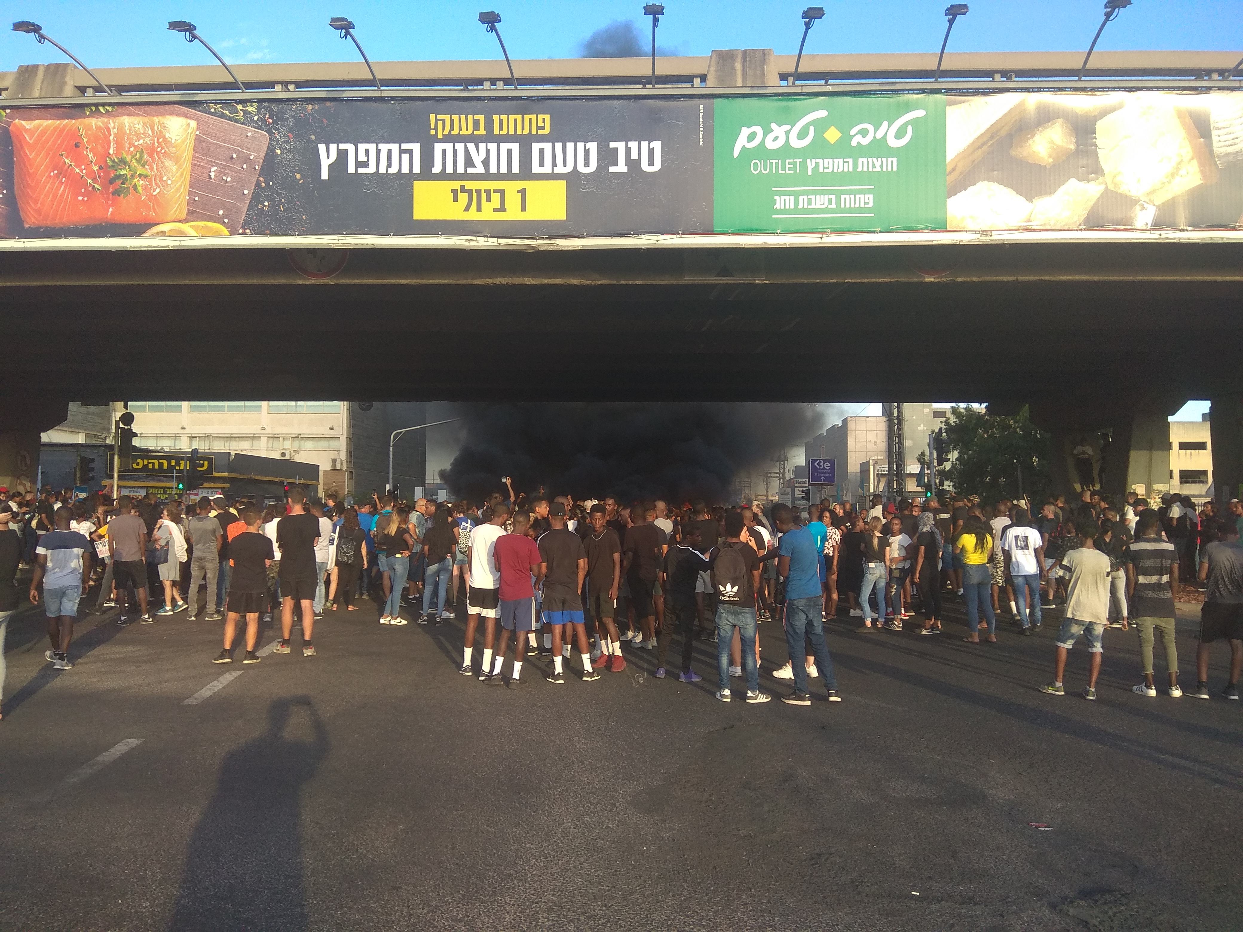 מפגינים בצומת קריית אתא